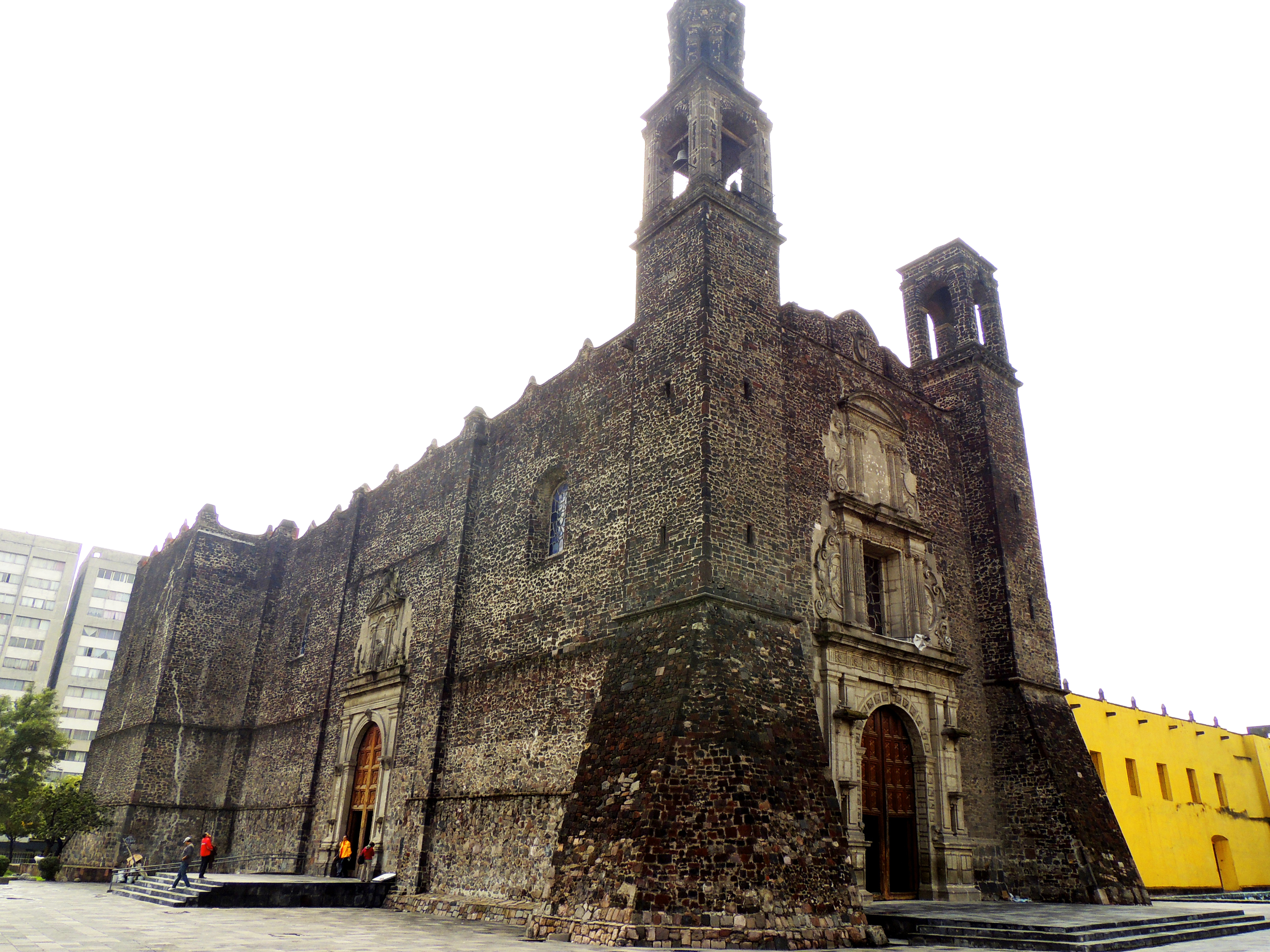 Templo de Santiago Tlatelolco